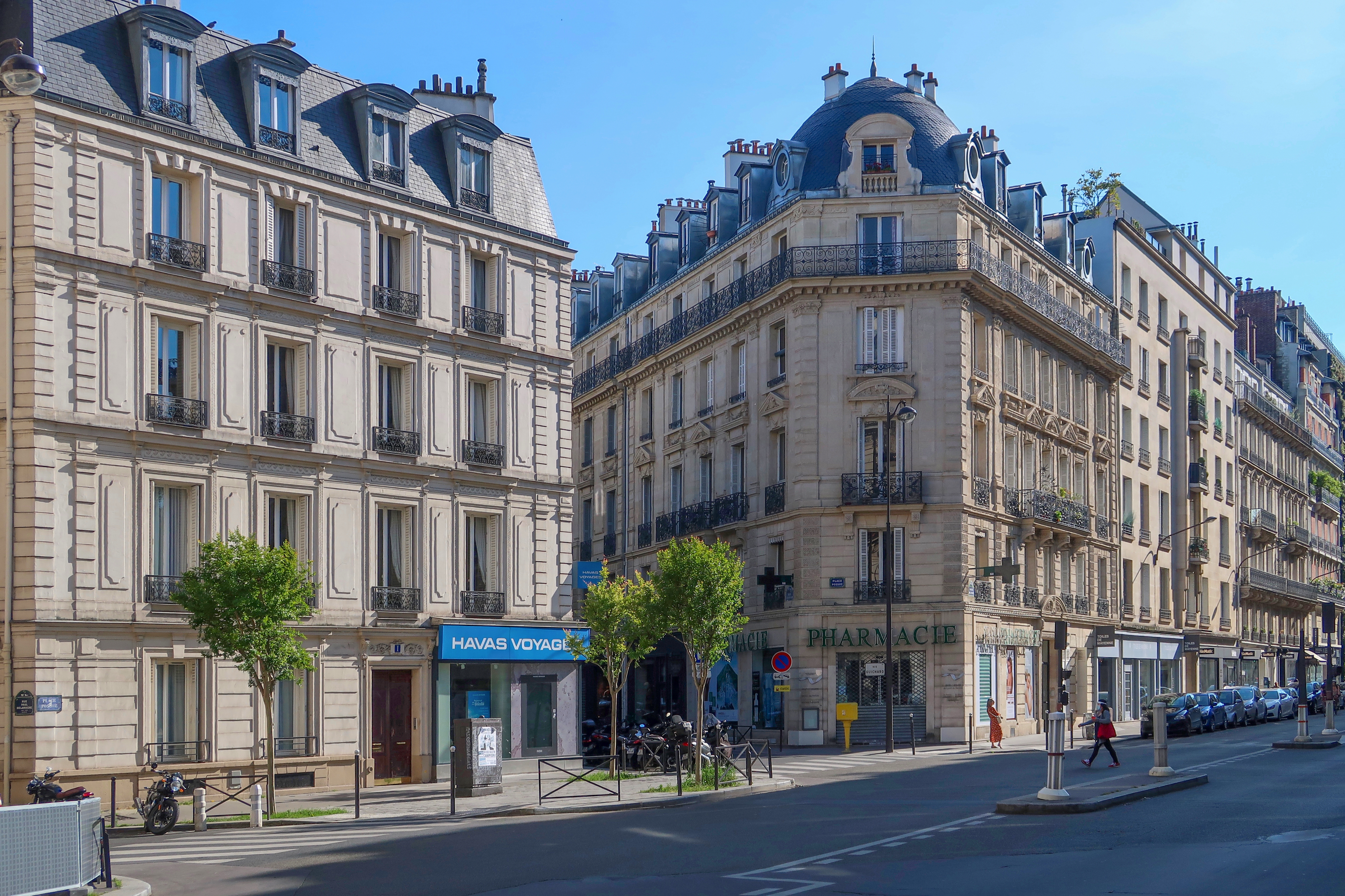 Partie sud de la place Possoz (Paris, 16e).